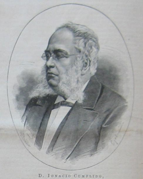 Don Ignacio Cumplido, impresor, escritor, periodista, y político mexicano de ideología liberal del siglo XIX